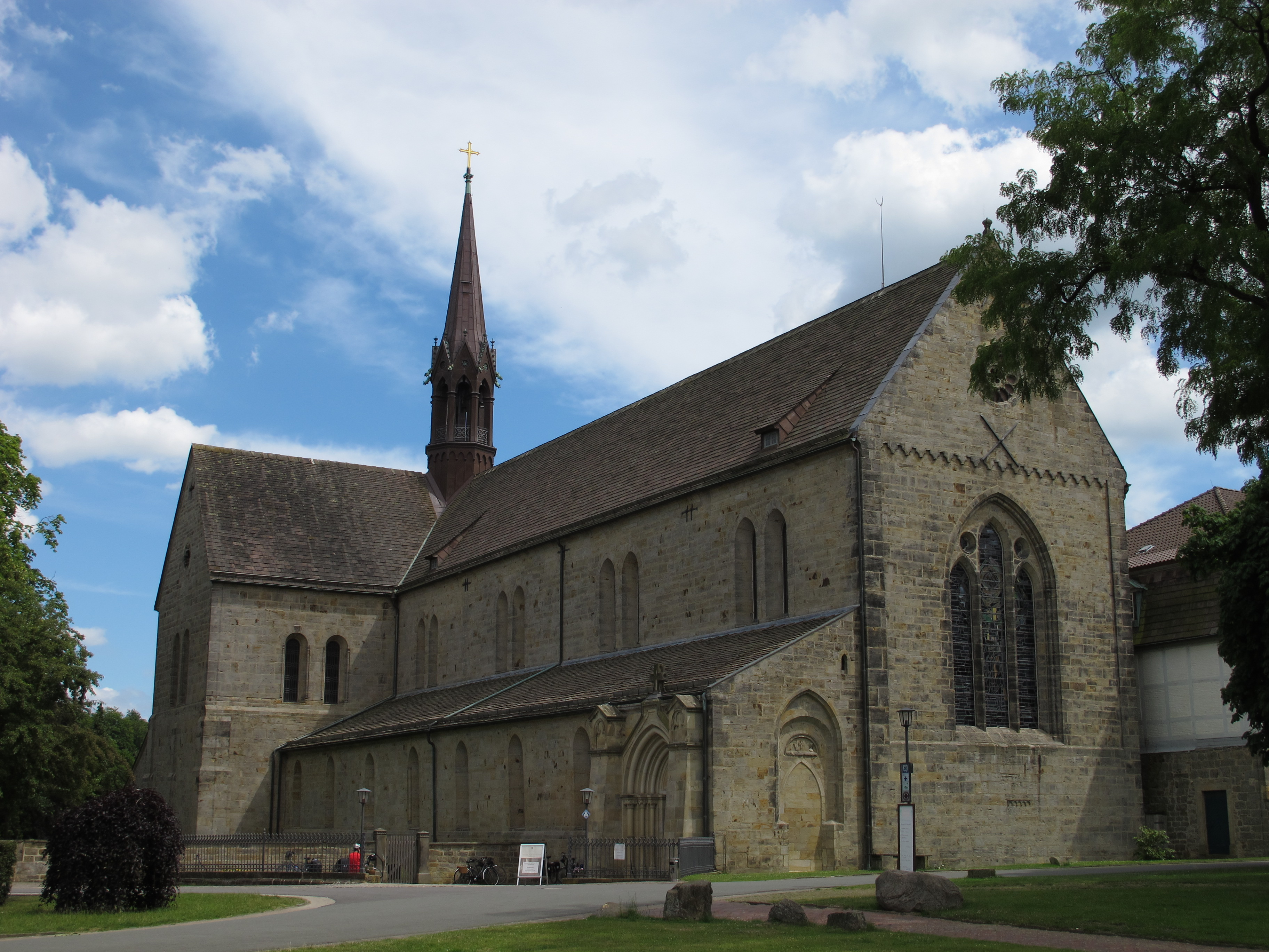 Klosterkirche Loccum: Außenansicht